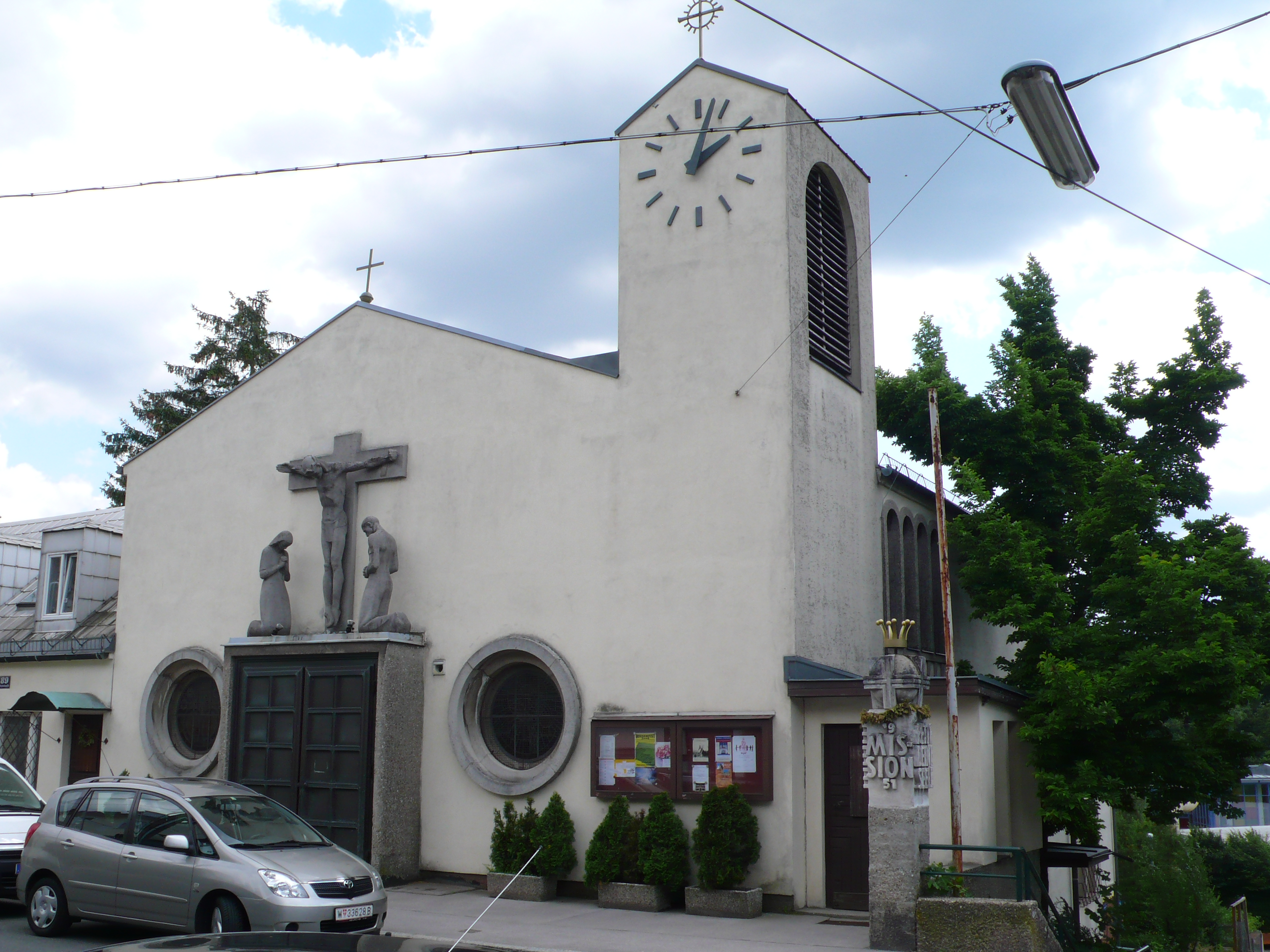 St.-Josef-am-Wolfersberg-Kirche, Penzing, Wien 14.